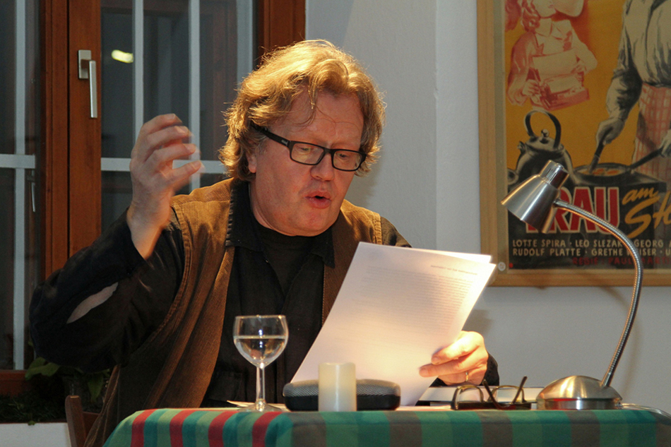 Hannes Vogler bei einer Lesung im Kotter, Gross-Enzersdorf (2015), Foto: Herbert Slad